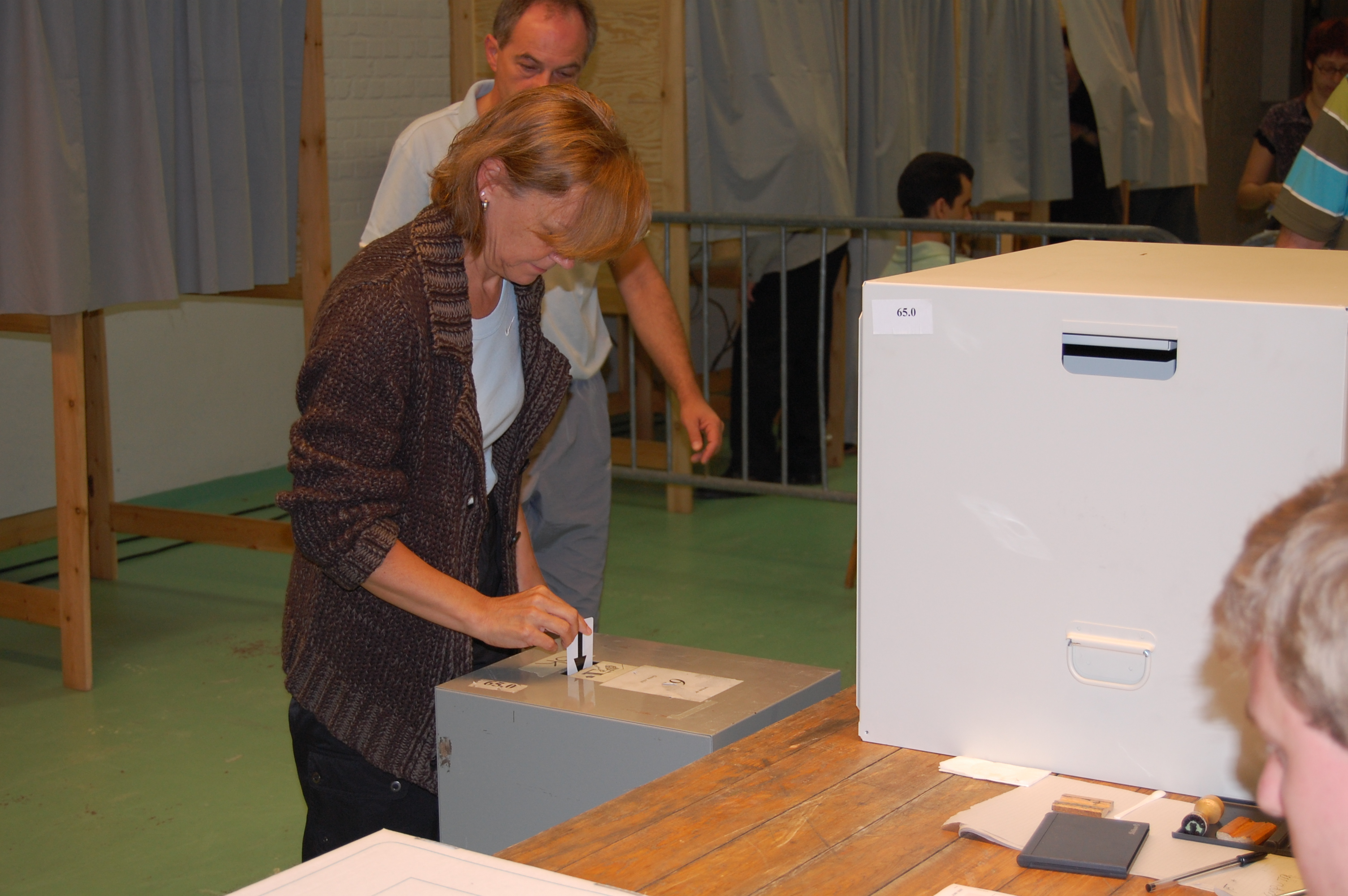 2007 federal elections in Belgium. Picture take in election bureau 65 in Wilsele, Leuven, Vlaams-Brabant, Belgium.